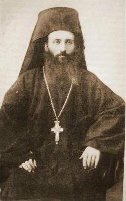 Емилианос Лазаридис Гревенски